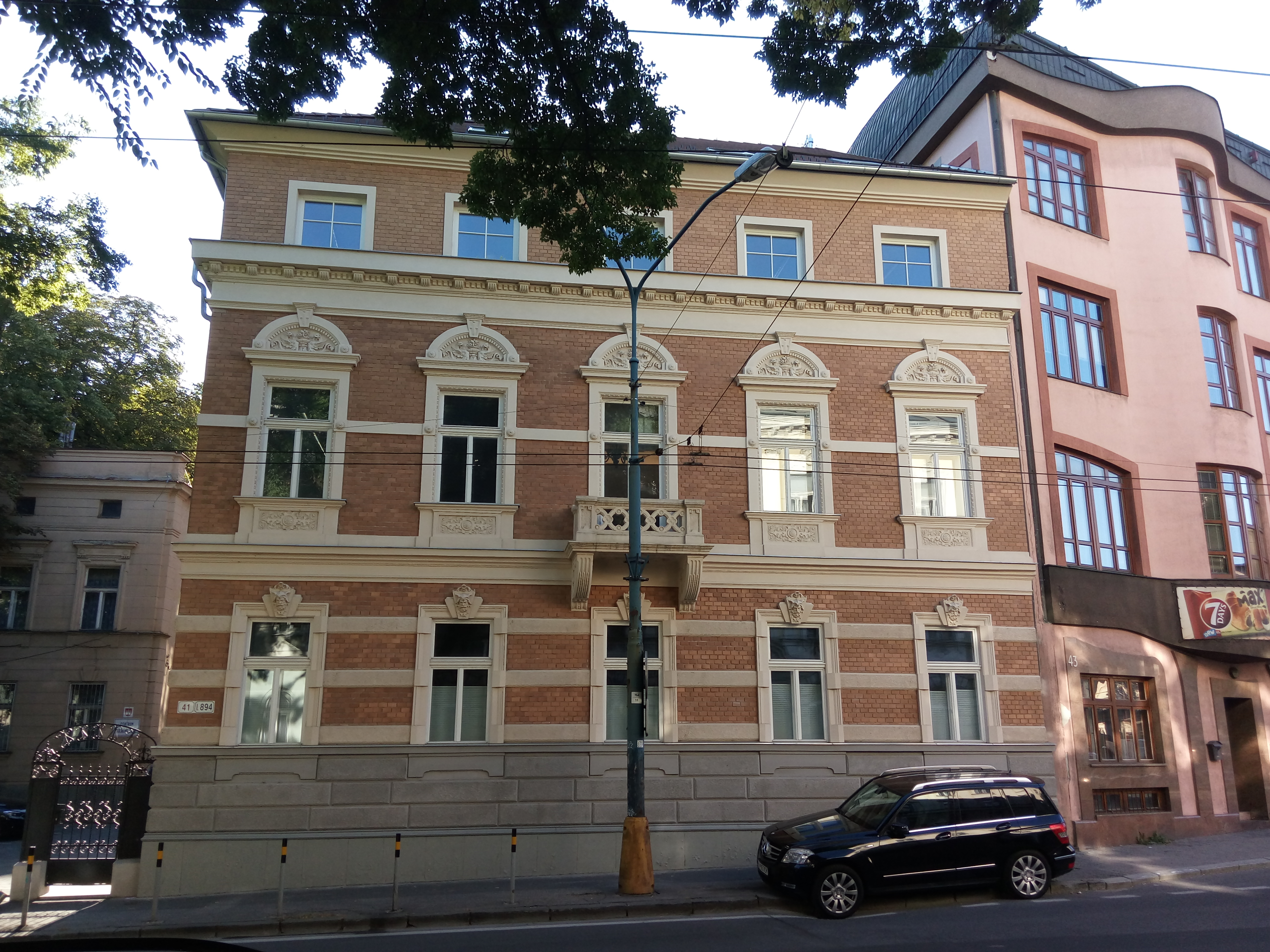 Štefánikova 41, Staré Mesto, Bratislava